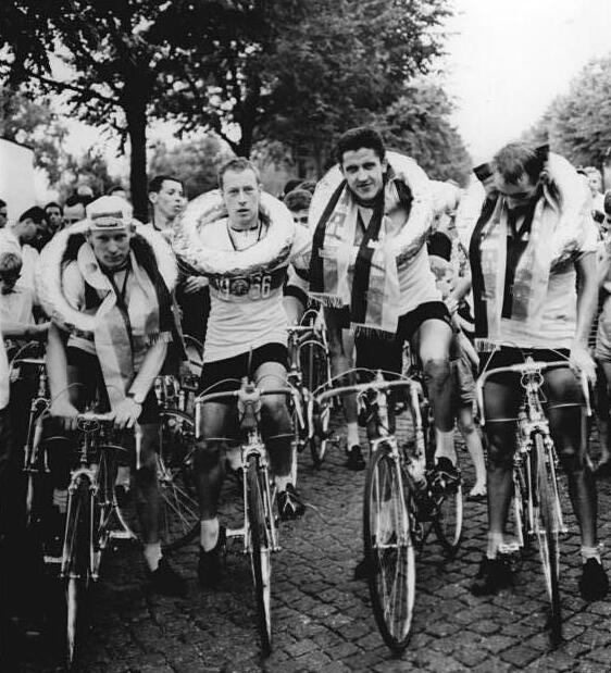 A. Peschel, K. Müller, L. Appler, E. Butzke Zentralbild Koch 18.6.1966 Leipzig: SC Dynamo Berlin gewann Mannschaftstitel. Neuer Deutscher Meister im Mannschaftsfahren auf der Straße wurde am 17.6.1966 in Leipzig der SC Dynamo Berlin vor dem Titelverteidiger ASK Vorwärts Leipzig. Die 98 km wurden bei drückender Hitze in 2:08:16,4 St. zurückgelegt. Axel Peschel, Kurt Müller, Lothar Appler und Eberhard Butzke (von links) begeben sich auf die wohlverdiente Ehrenrunde.